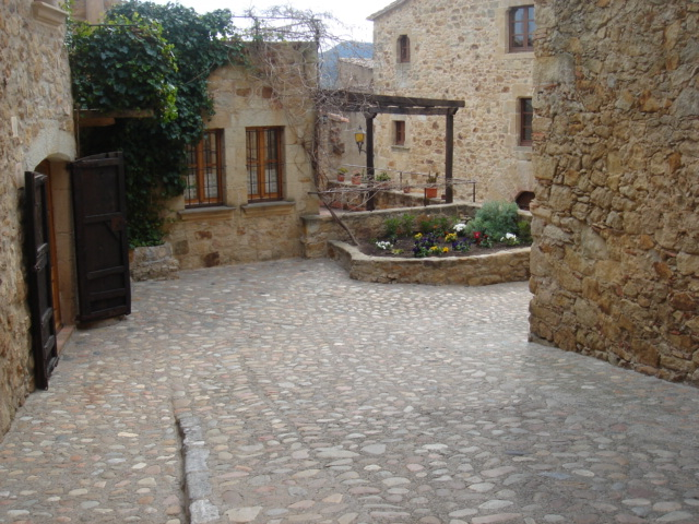 Pals.Ampurdan. Cataluña